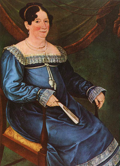 Madre del Libertador de Chile, Bernardo O'Higgins Riquelme